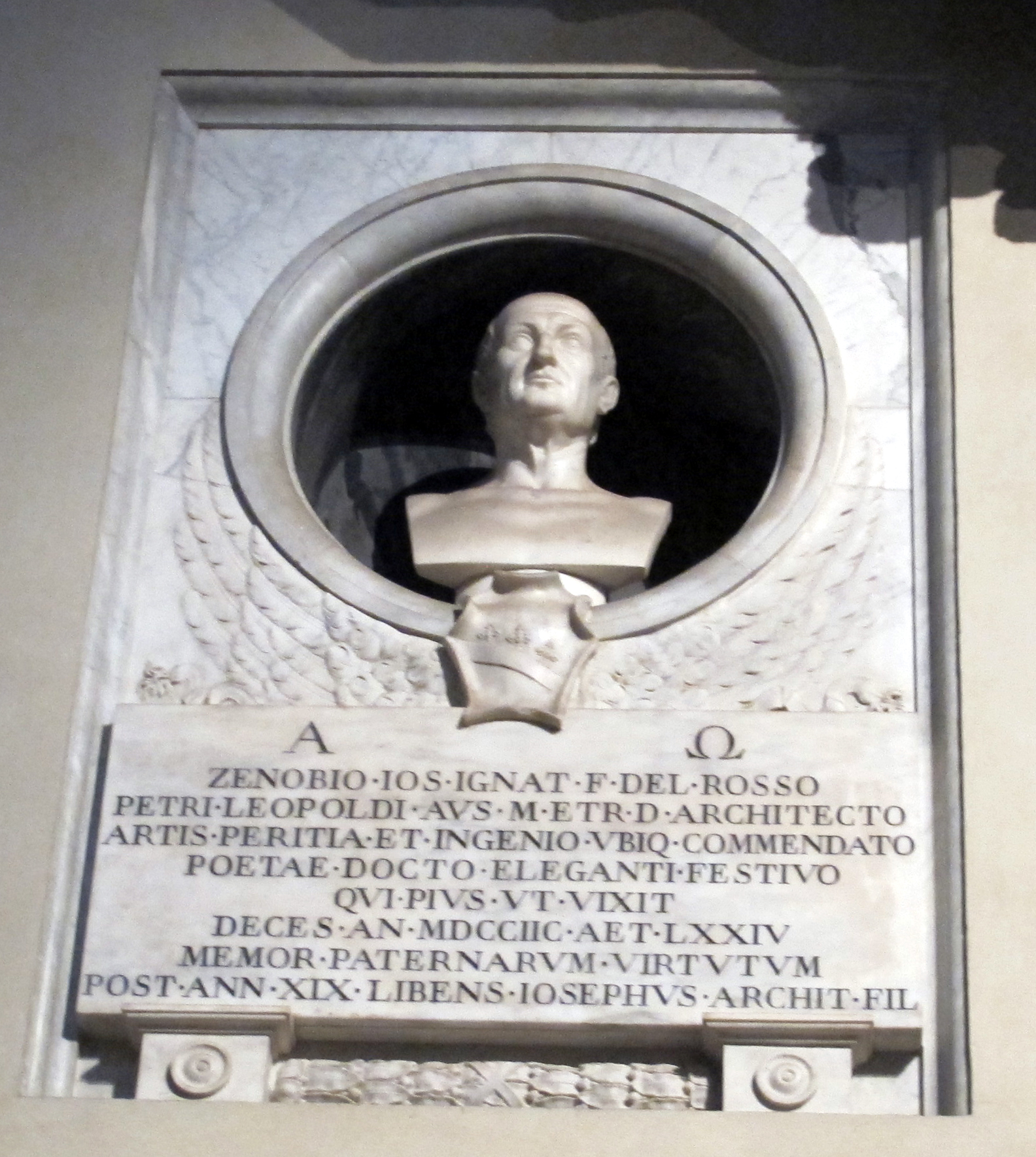 Smn, navata sx, giovan battista giovannozzi, monumento a zanobi del rosso, 1817